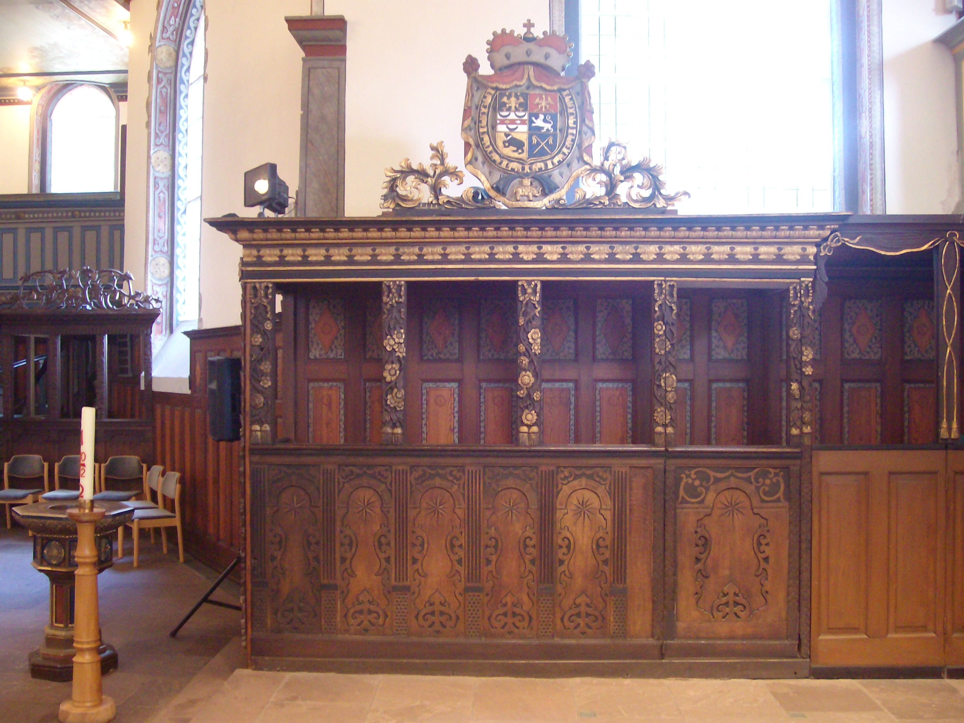 Fürstenstuhl der Lutherkirche in Leer, Ostfriesland